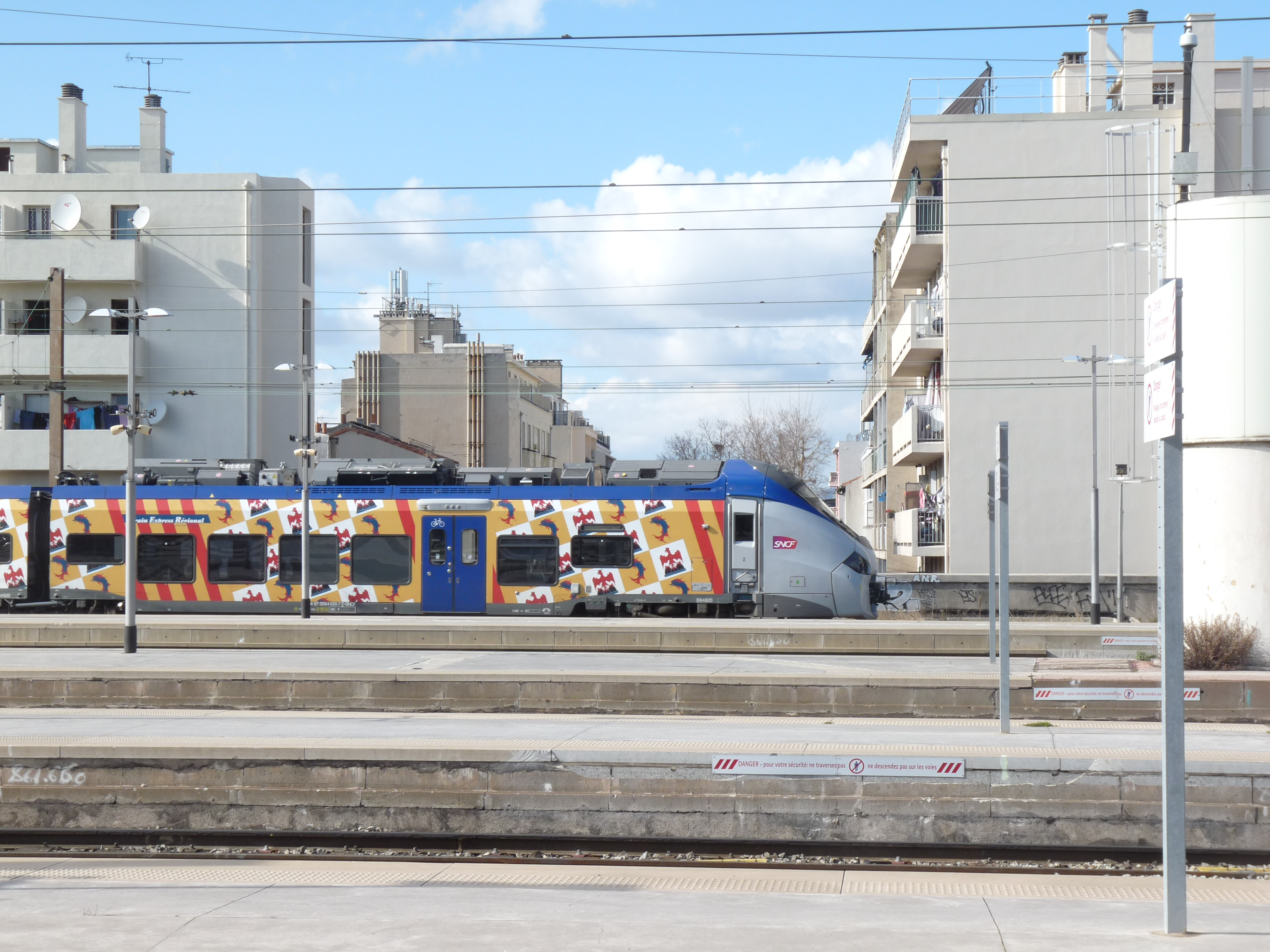 Treinen in het voorstation van Marseille-Saint-Charles